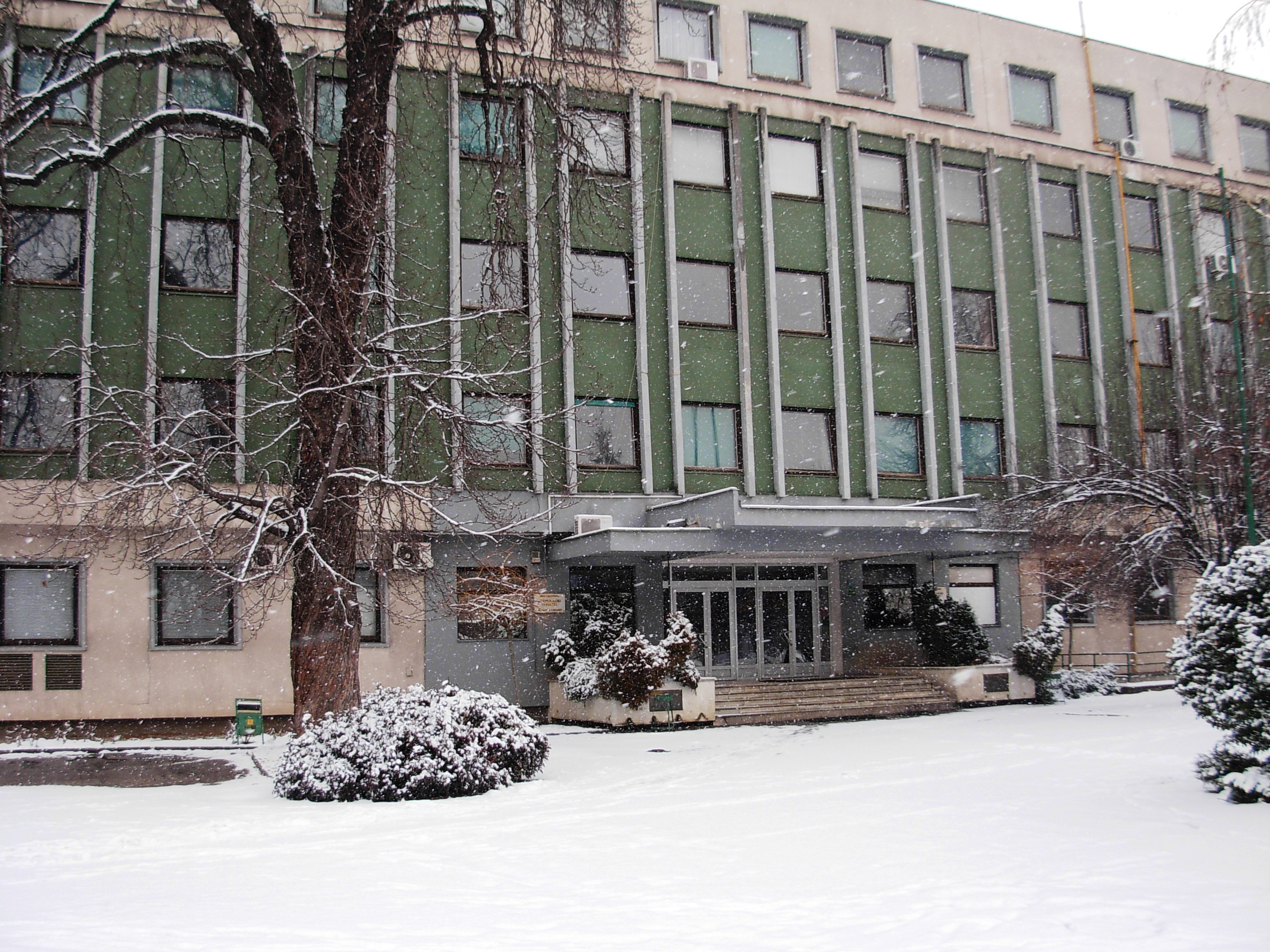 Veterinarski fakultet u Sarajevu.